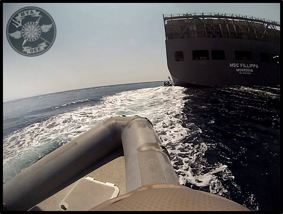 OEE Ρεσάλτο